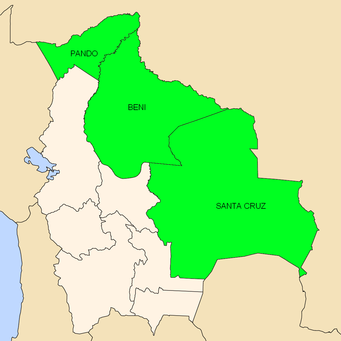 Departamentos que componen el Oriente Boliviano